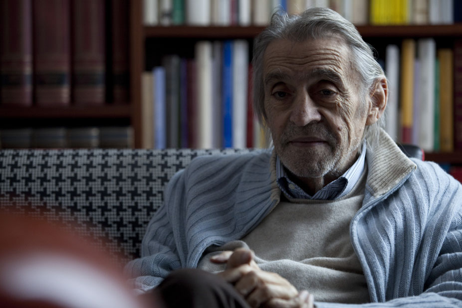 Renato Borsoni ritratto nella sua casa nel 2012